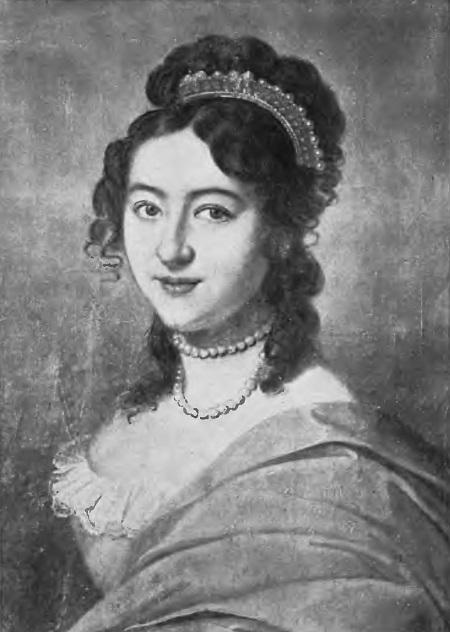 Eufrozyna z Szołajskich Tyszkiewicz